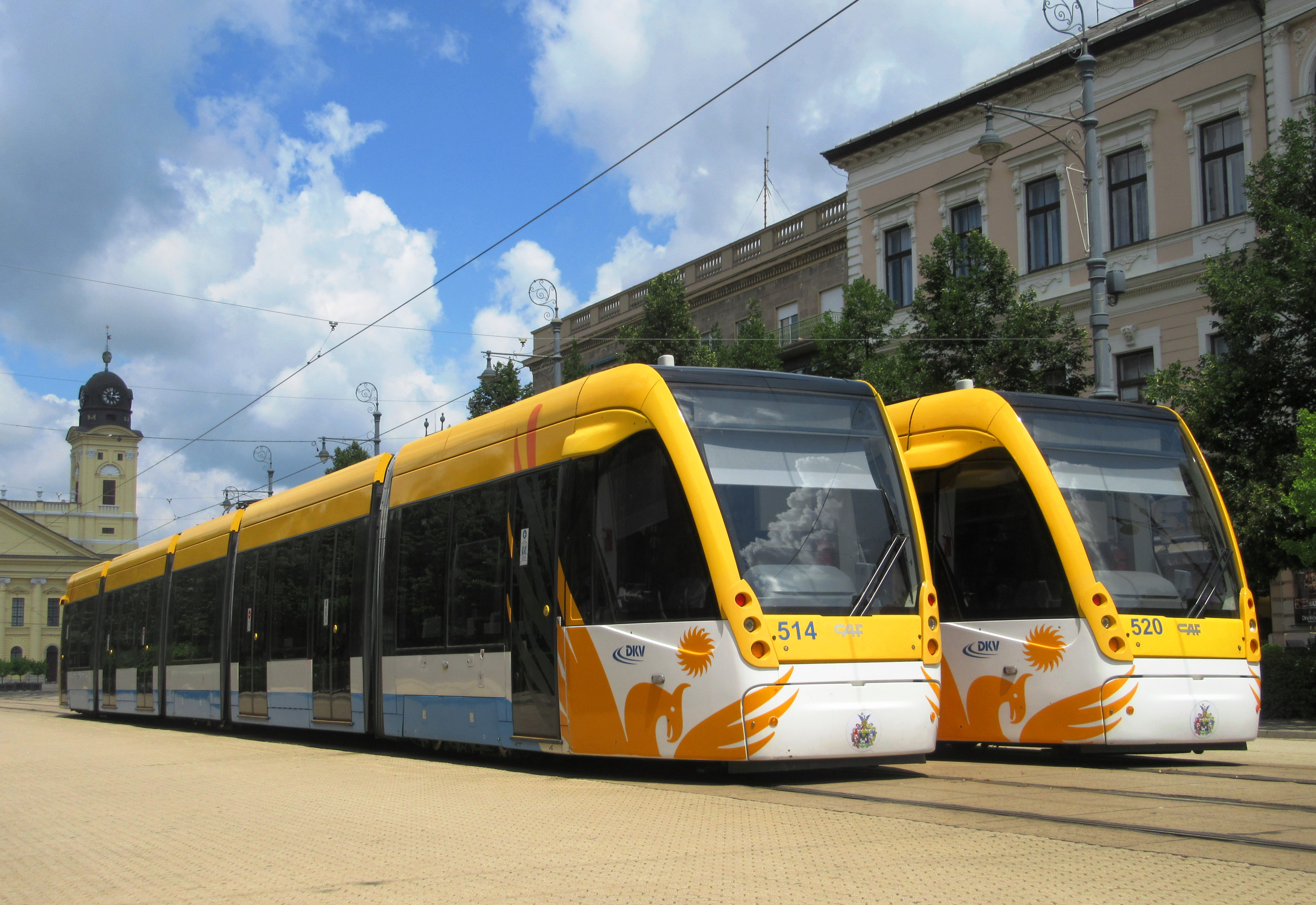 CAF Urbos 3